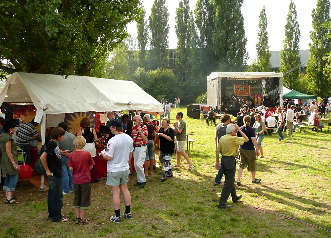 Fährmannsfest eintrittfreier Bereich mit Bühne